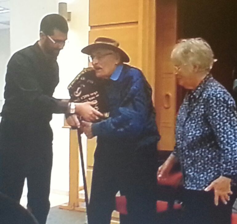 שמואל ורעייתו בשיחה שהעביר לתלמידים בישיבה התיכונית 'לפיד' מודיעין בעשרה בטבת תשע"ו